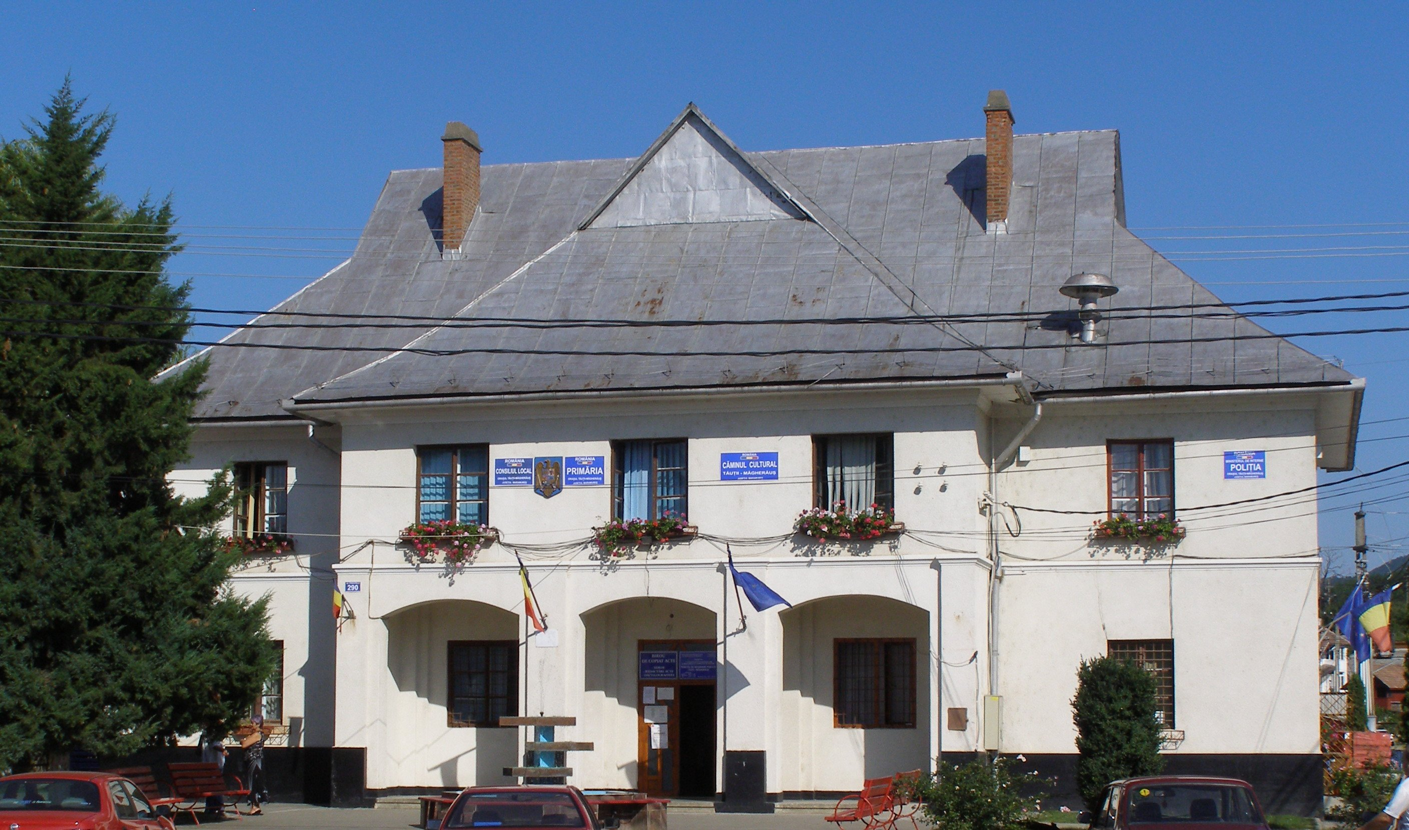 Primăria din Tăuţii-Măgherăuş (MM)